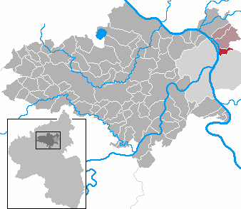 Urbar in Rhineland-Palatinate - district Mayen-Koblenz